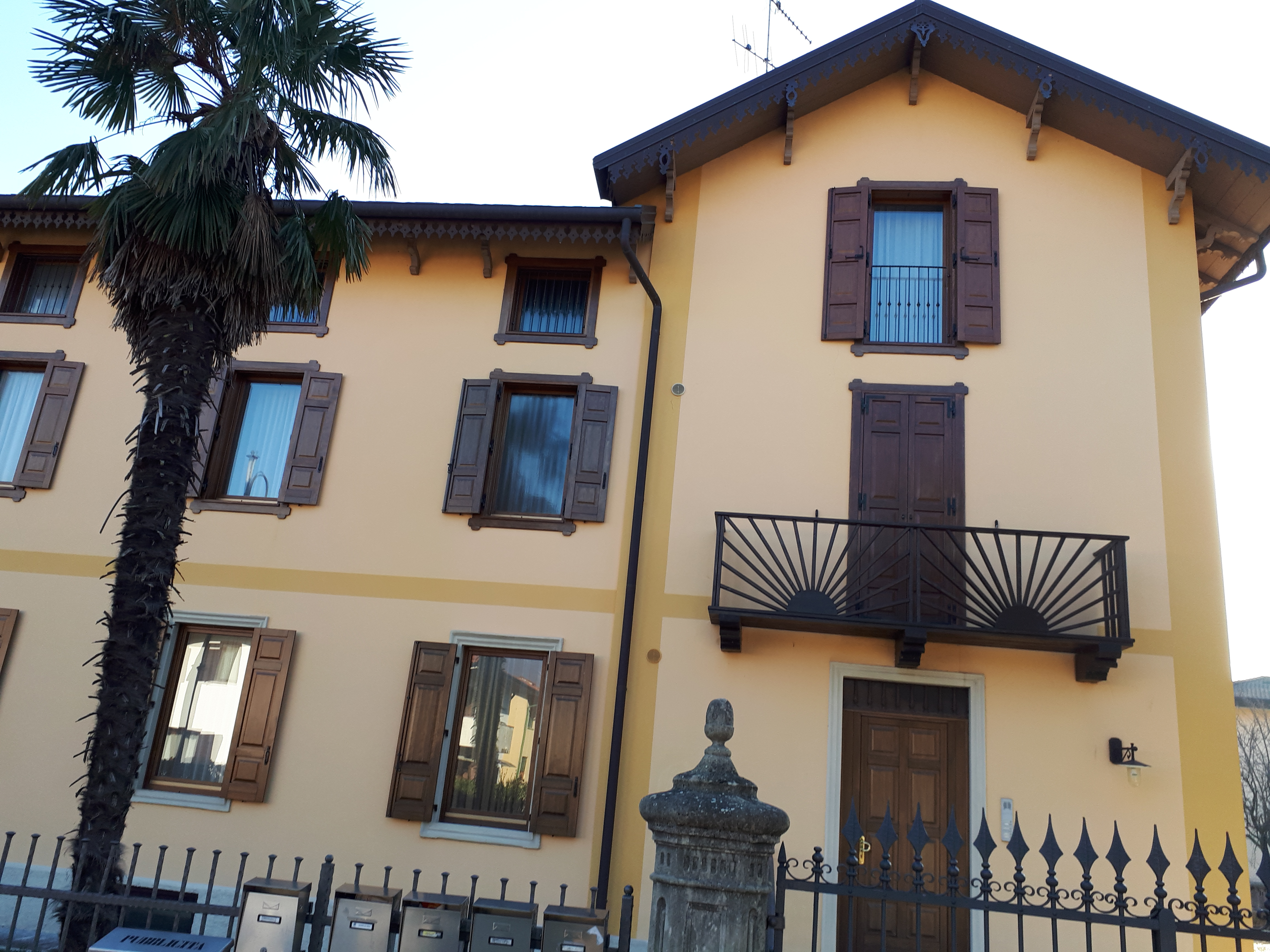 Particolare del villino eretto da Luigi Cazzola in prossimità del lanificio